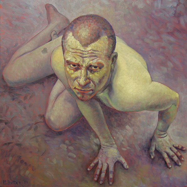 Self-portrait